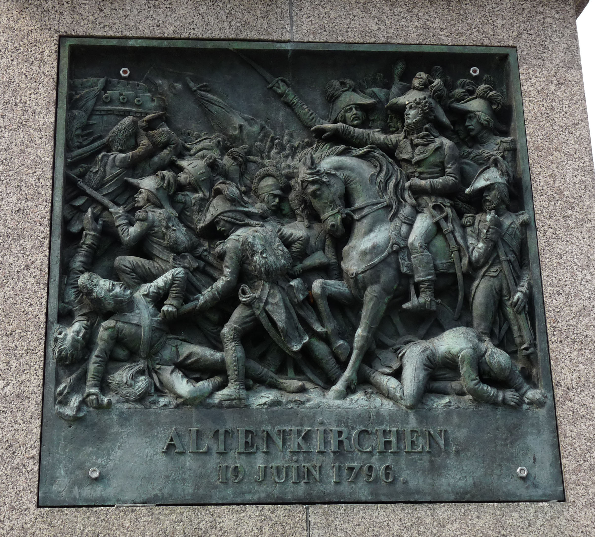 Le général Kléber victorieux à Altenkirchen, 19 juin 1796 (socle de la statue du général sur la place Kléber à Strasbourg